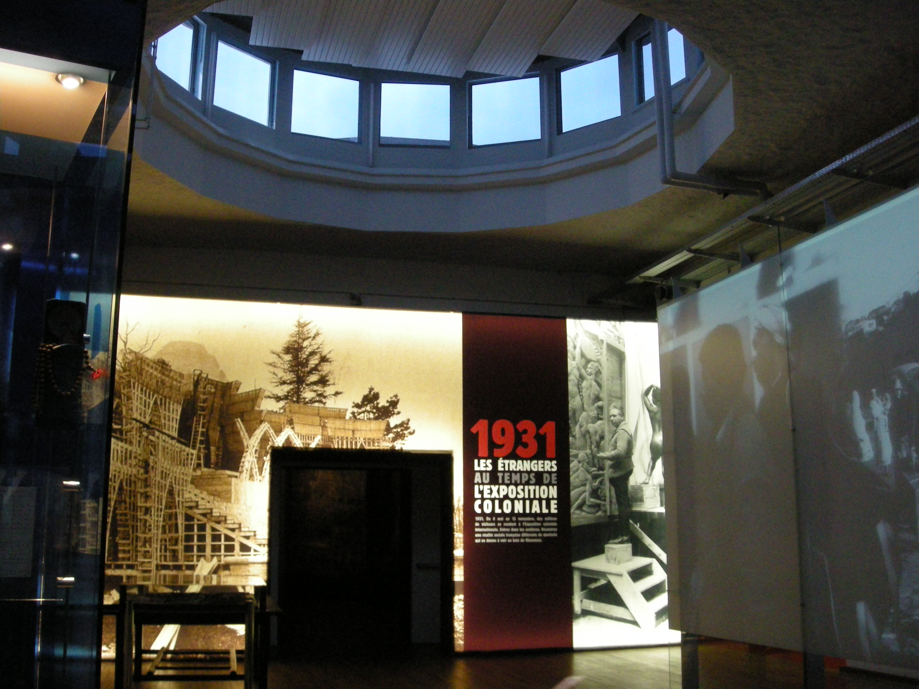 Exposition temporaire à la Cité nationale de l'histoire de l'immigration à Paris